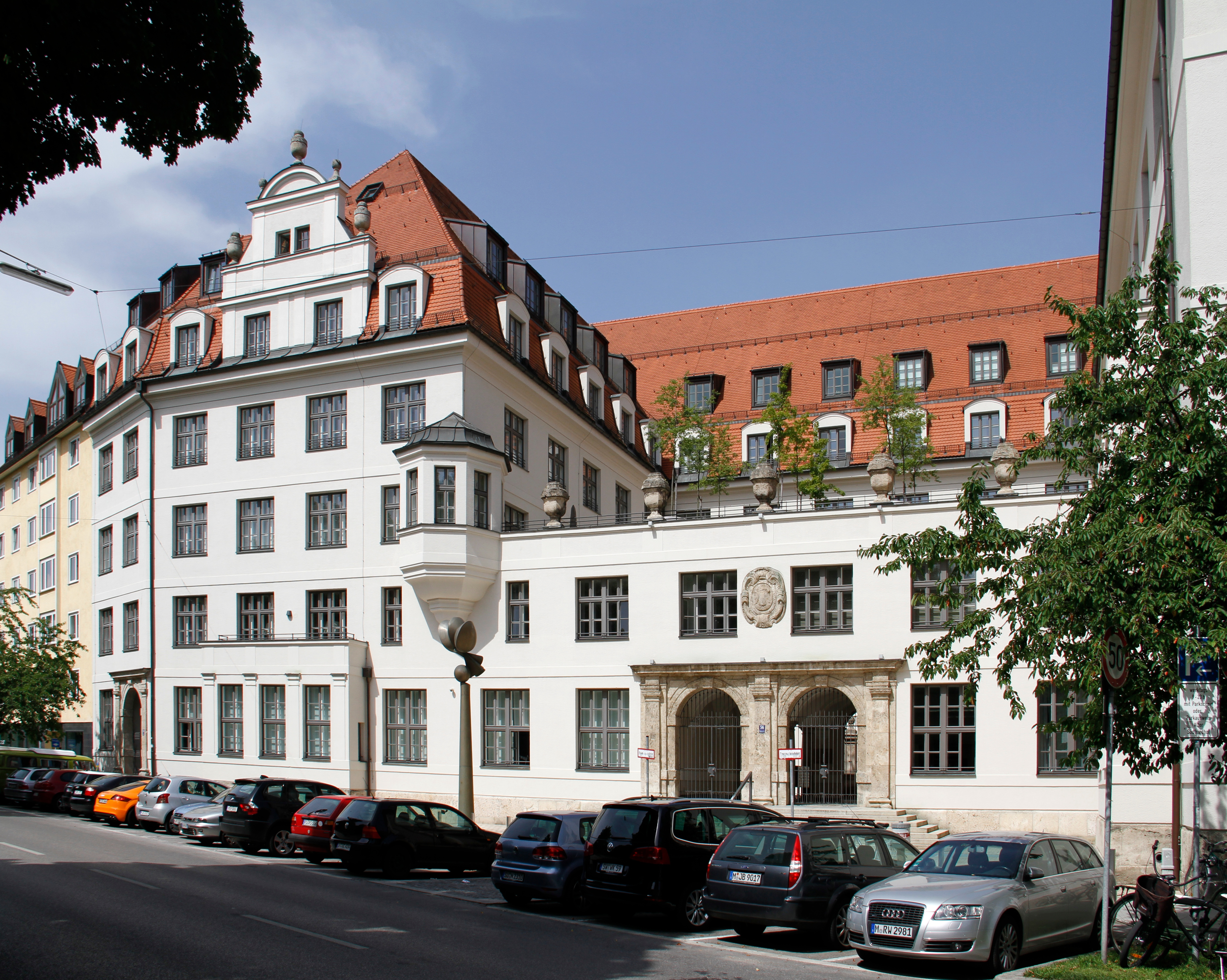 Thalkirchner Straße 54-60, München. Ehemaliges städtisches Arbeitsamt, errichtet 1912/13 von Hans Grässel. Umgebaut als Wohngebäude durch Phillip Starck.